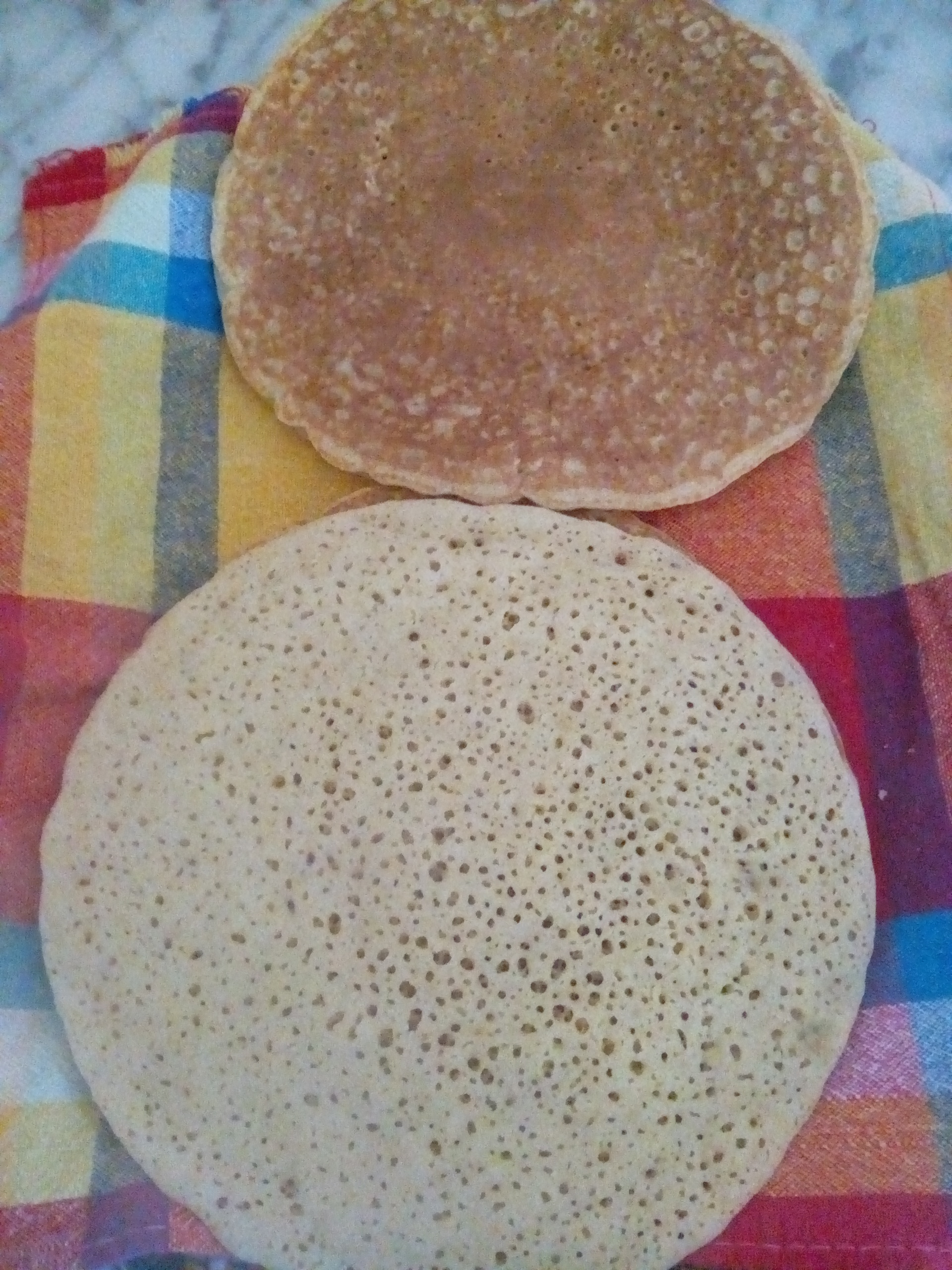 Plat traditionnel